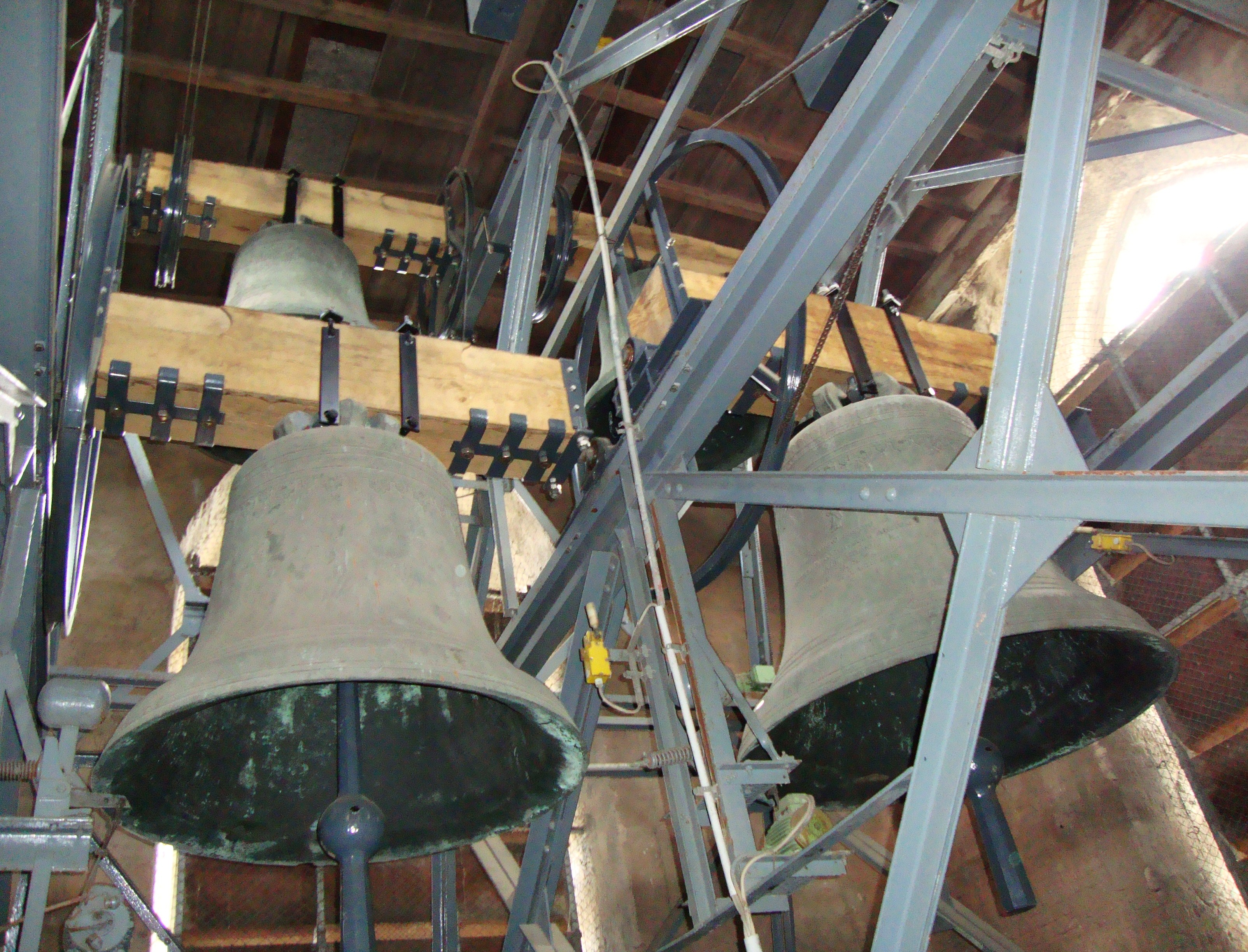 Glockenstube von St. Severin in Köln. Links: Glocke 2, darüber: Glocke 3, rechts: Glocke 1, darüber: Glocke 4.